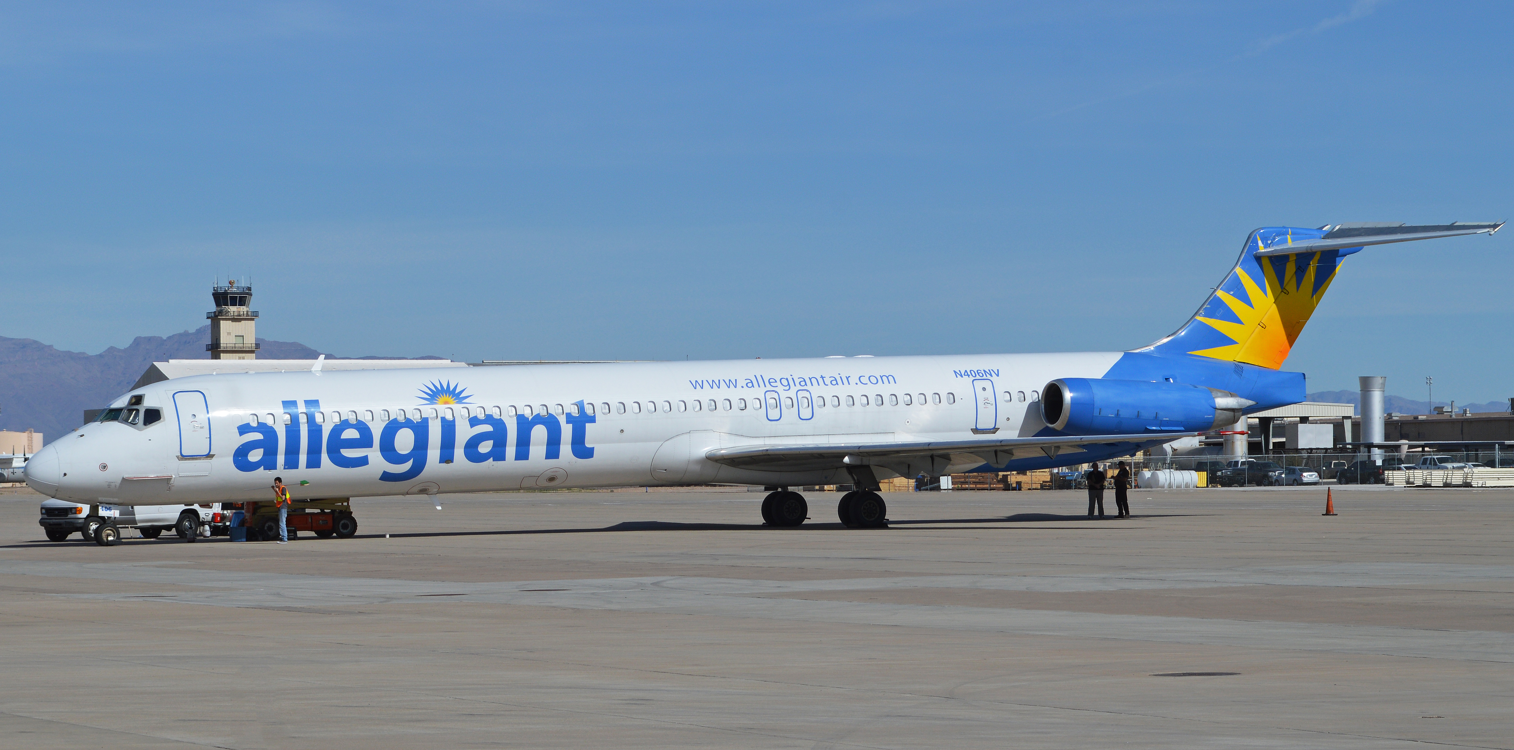 c/n 49900, l/n 1765. Phoenix-Mesa Gateway Airport. Arizona, USA. 11-2-2014